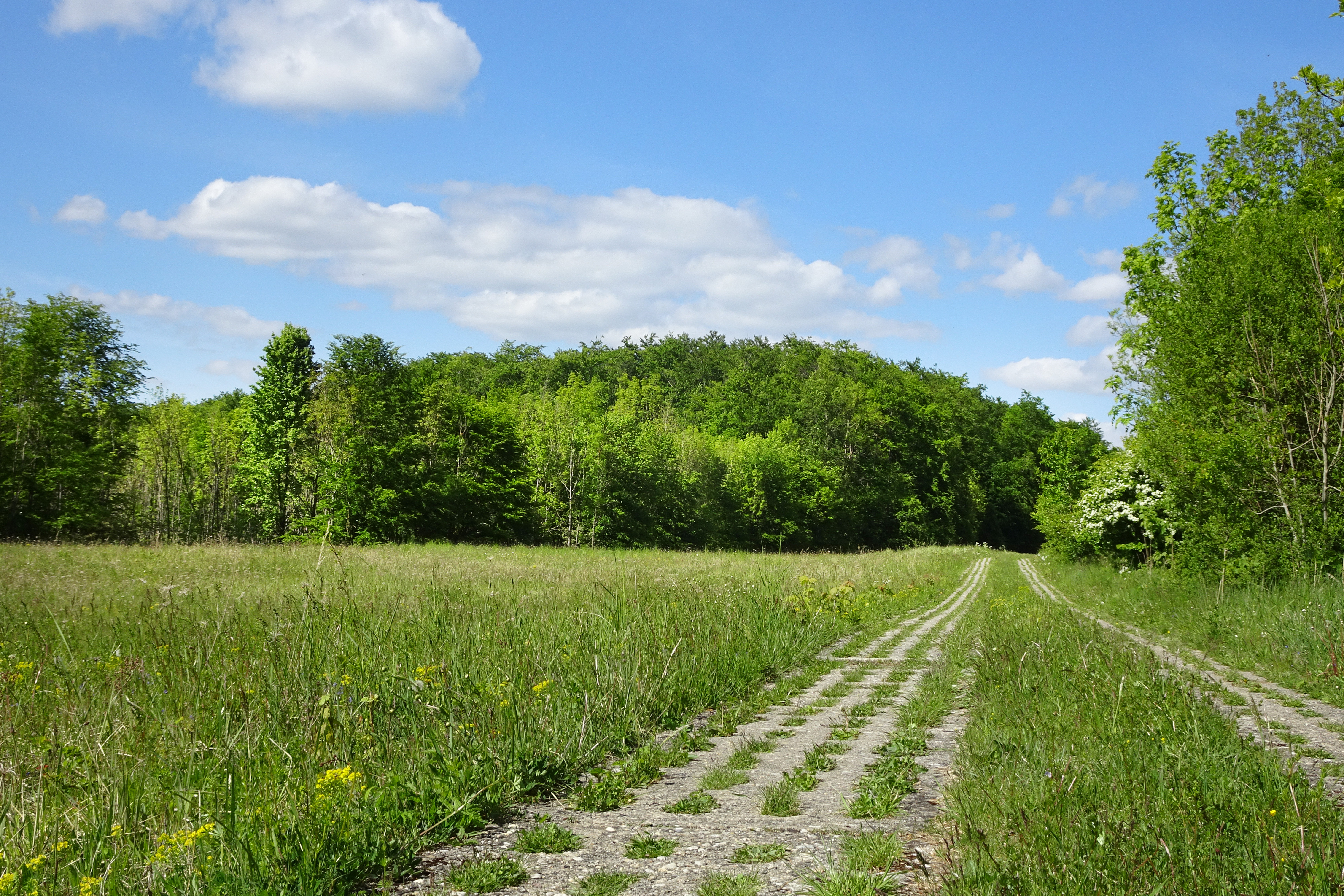 Mit der Ausweisung des „Grünen Bandes“ durch den Thüringer Landtag am 9. November 2018 zum Nationalen Naturmonument, wurde entlang der ehemaligen innerdeutschen Grenze ein einheitlicher Schutz besonderer Landschaftsteile und kulturhistorisch bedeutsamer Gebiete möglich.